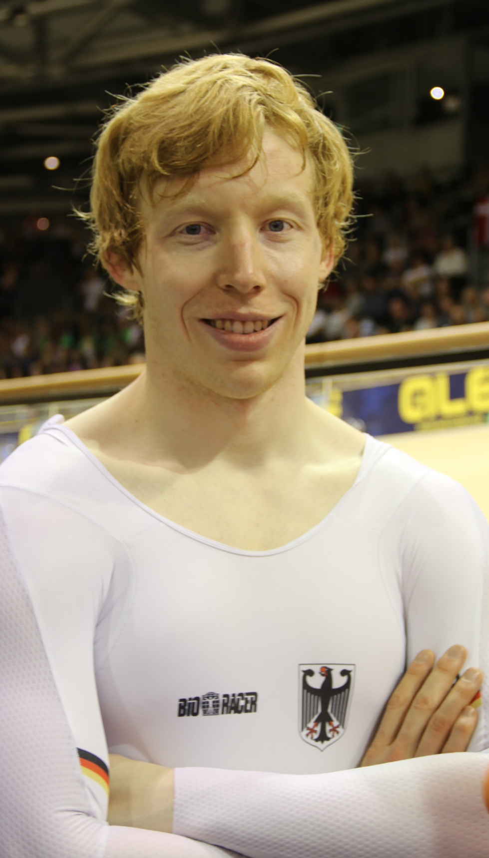 Joachim Eilers, deutscher Radsportler